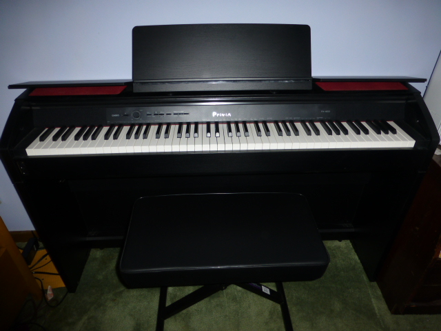 Casio electric piano